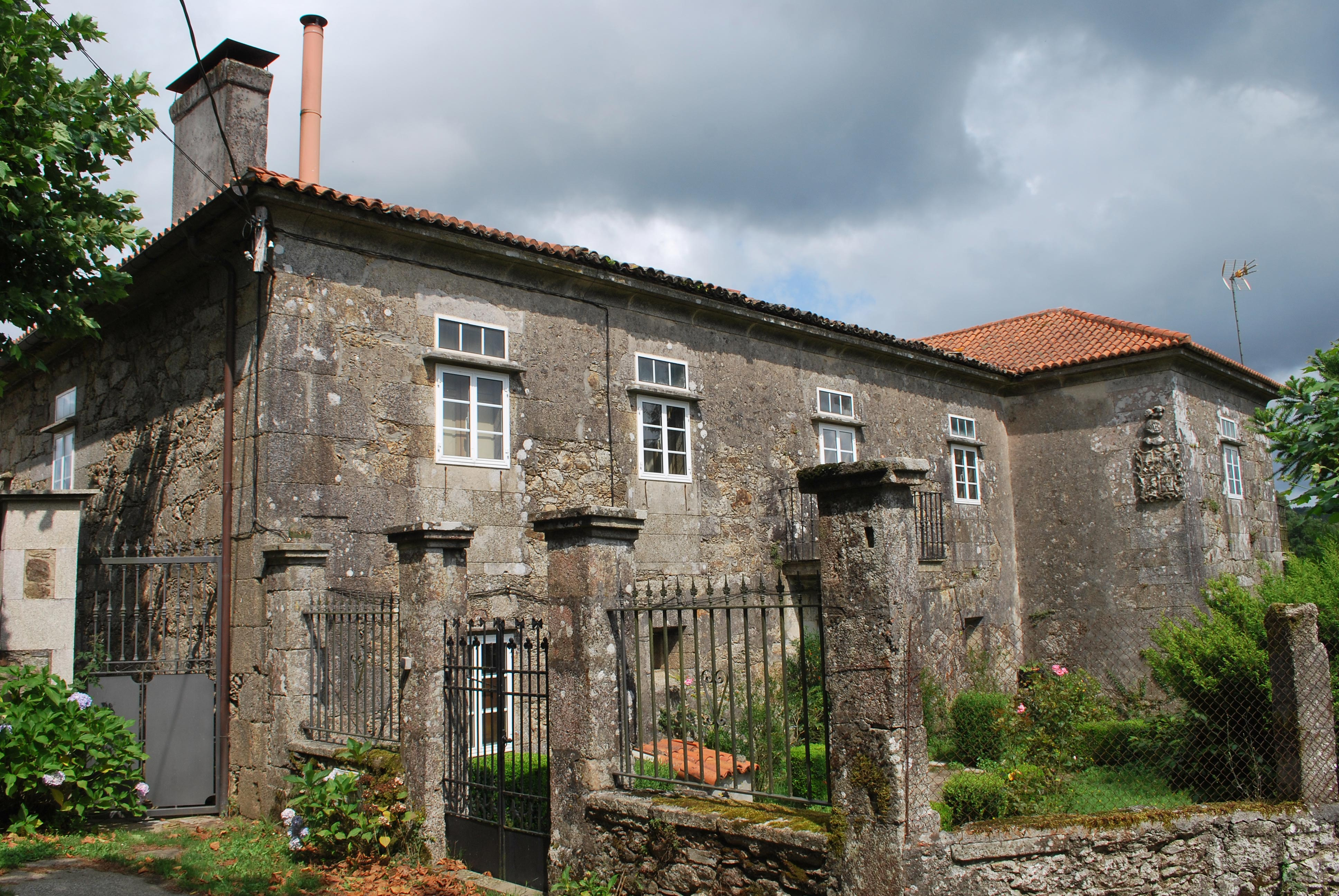 Vista da fachada do pazo de Présaras en Vilasantar